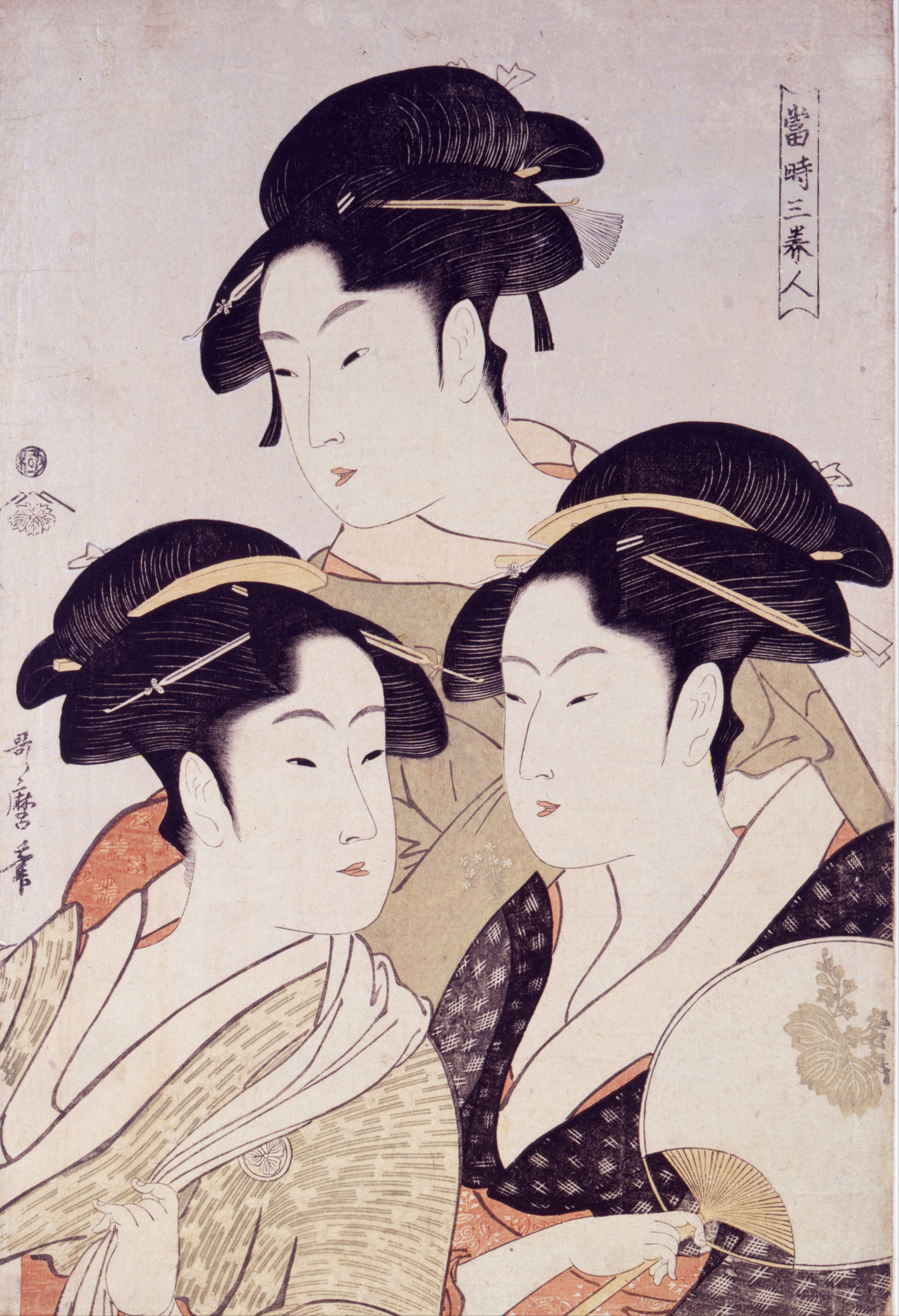 寛政三美人：富本豊ひな（上）、難波屋おきた（右）、高島屋おひさ（左）